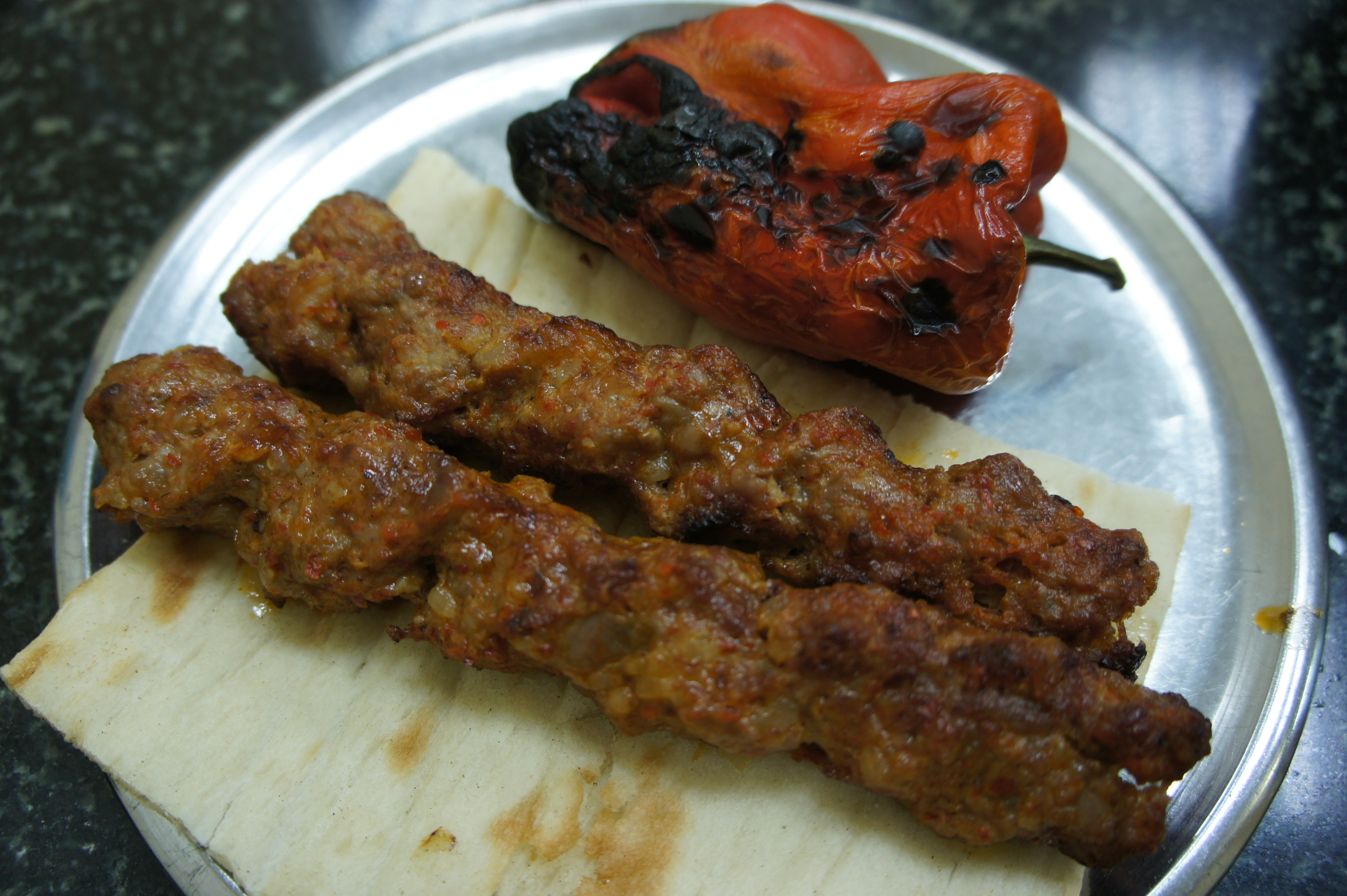 Kurdî: Kebaba Edeneyê, Amed.